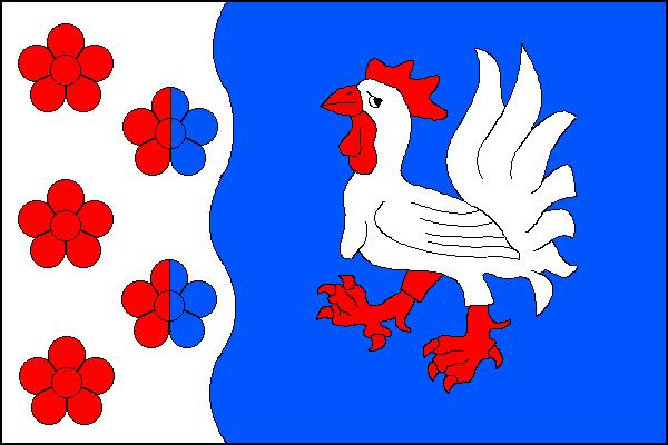 Vlajka obce Studnice (okres Náchod)